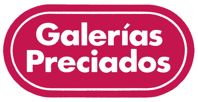 Logotipo de Galerías Preciados